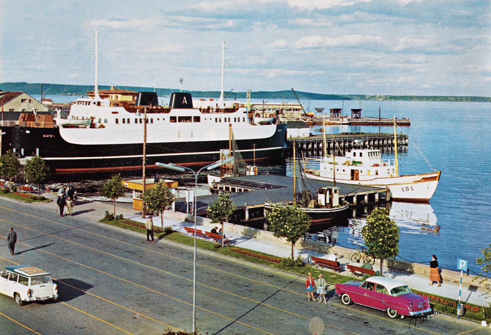 Tittel / Title: Norge: Horten. Fergen Horten - Moss Motiv / Motif: Postkort. Den røde og hvite bilen tilhørte postkortforlaget. C-C-2 (produksjonsnr fra Normann) Dato / Date: utgitt på slutten av 1960-tallet Fotograf / Photographer: Normann Sted / Place: Horten, Vestfold Eier / Owner Institution: Nasjonalbiblioteket / National Library of Norway Bildesignatur / Image Number: blds_02248